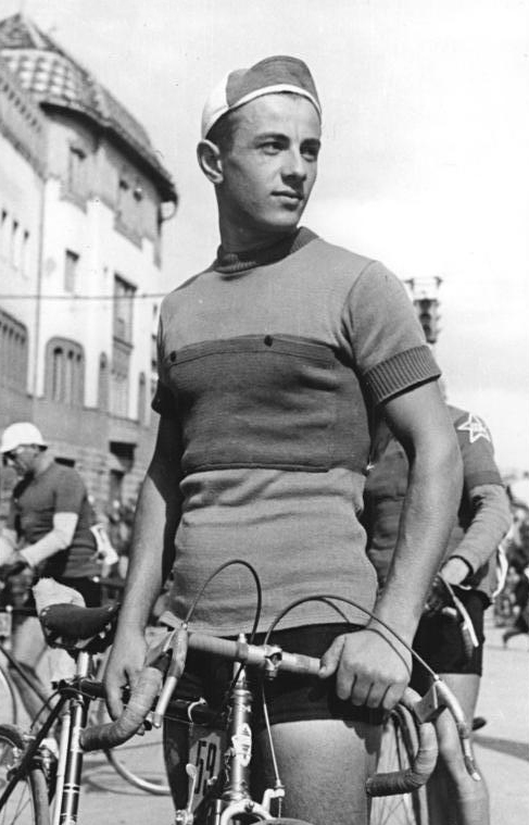 Gabriel Moiceanu Zentralbild Agerpres-IX 4.4.1955 - Gemeinsames Training deutscher und rumänischer Radfahrer (Rumänien) - Seit ungefähr vier Wochen bereiten sich die Radfahrer der Rumänischen Volksrepublik und der Deutschen Demokratischen Republik im Trainingszentrum Cluj (Transylvanien) gemeinsam für die VIII. Friedensfahrt Prag-Berlin-Warschau vor. Täglich werden von den Radsportlern beider Mannschaften die Strassen ausserhalb der Stadt befahren. Meister des Sports Gustav-Adolf Schur (DDR) gewann am 27.März 1955 ein Strassenrennen im Spurt vor dem rumänischen Friedensfahrer Dumitrescu. Die Strecke verlief von Cluj nach Juedin und betrug 120 km. In einer Prüfung über 160 km, deren Start und Ziel in Cluj waren, gelang es Gustav-Adolf Schur am 3. April 1955 erneut, einen Spurtsieg herauszufahren. UBz: Gabriel Moiceanu - 21 Jahre - Photograph. Eine "Hoffnung" des rumänischen Radsports. Vierter in der Rumänienrundfahrt. Er nahm an der Ägyptenfahrt teil.